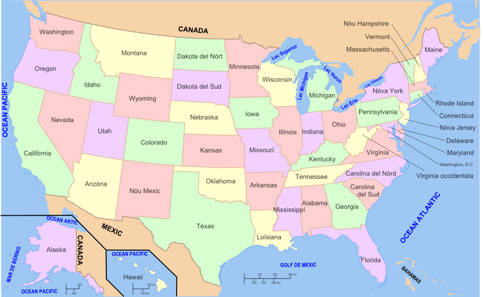 Mapa dels Estats dels Estats Units d'America